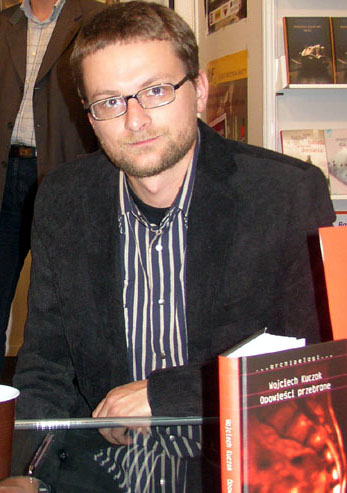 Wojciech Kuczok na Targach Książki w Krakowie w 2005 roku.